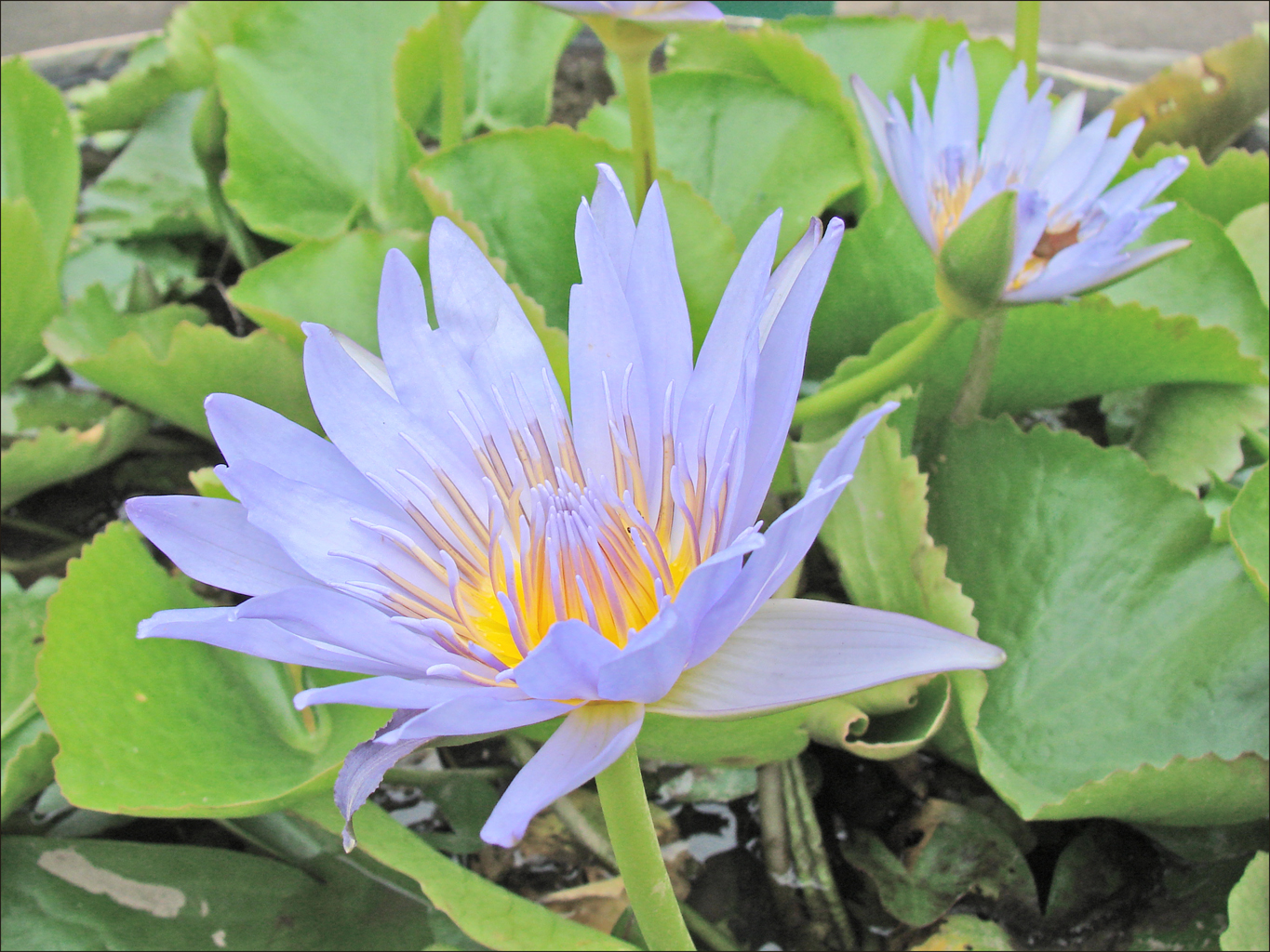 Fleur de lotus (Nymphaea caerulea) dans le Palais royal de Phnom Penh Article de Wikipedia